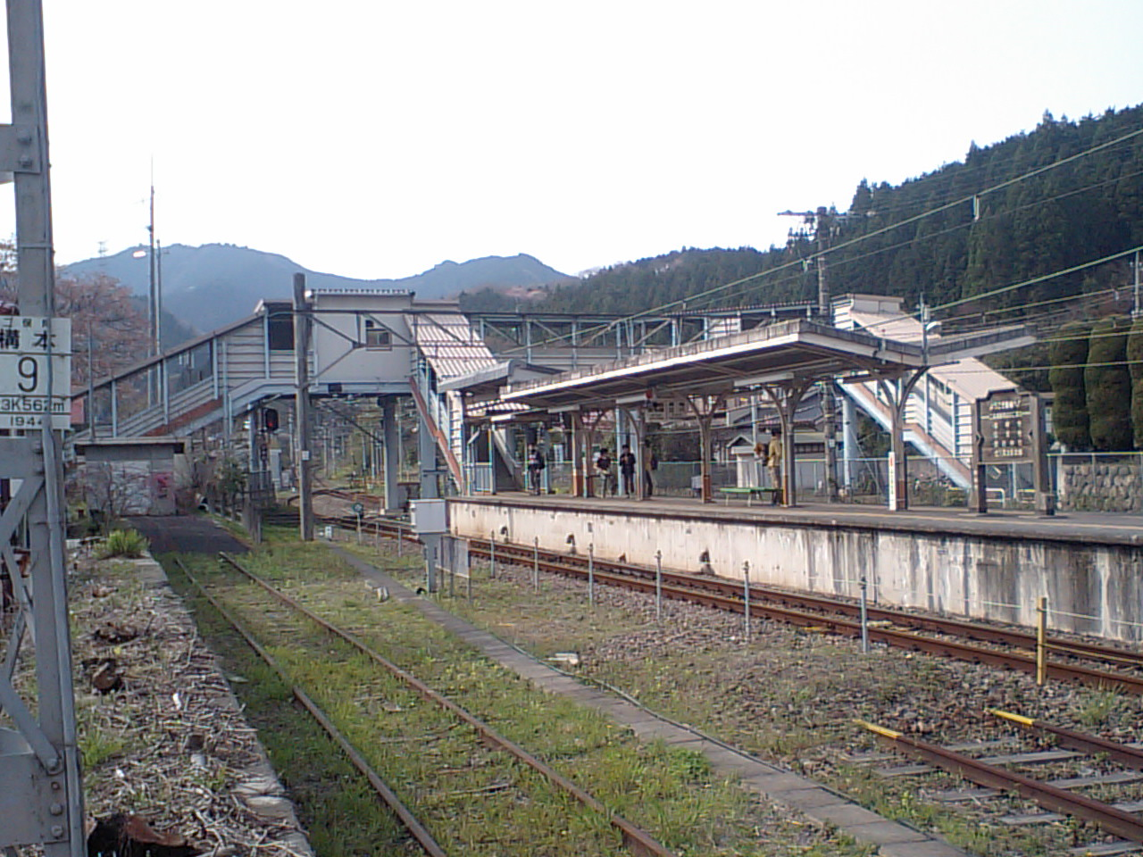 二俣尾駅 Ome City TOKYO JAPAN